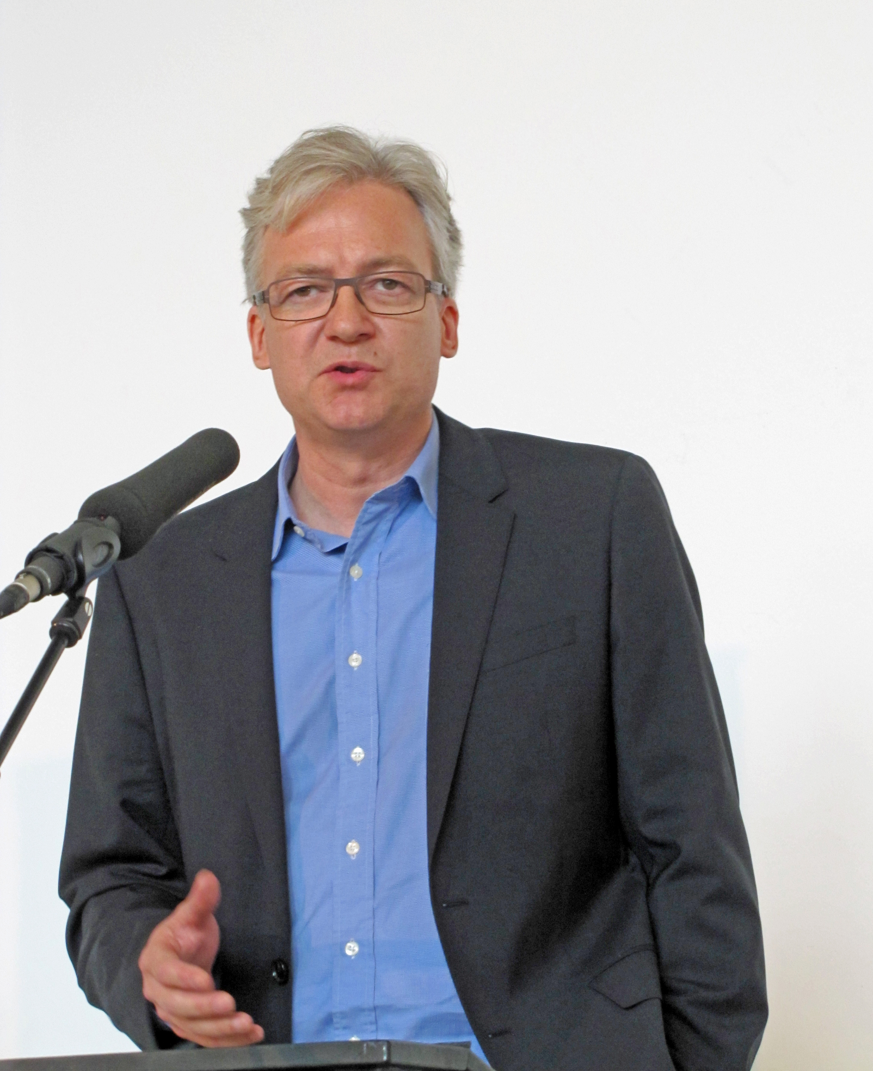 Ullrich Fichtner, Reporter des SPIEGEL in Paris, 2013 bei den Römerberggesprächen in Frankfurt am Main.